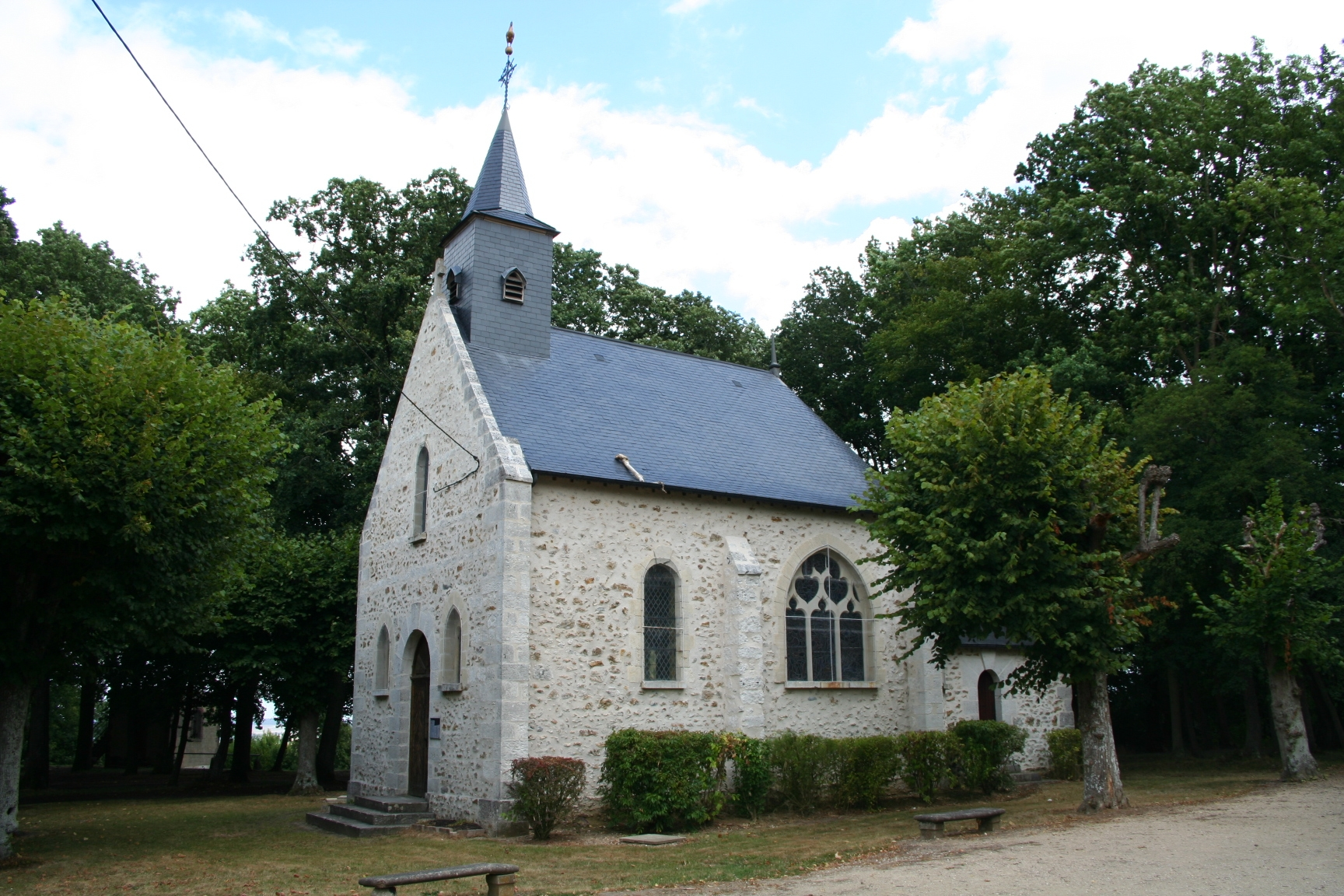 Chapelle Notre-Dame-de-la-Mer à Jeufosse, Yvelines (France)